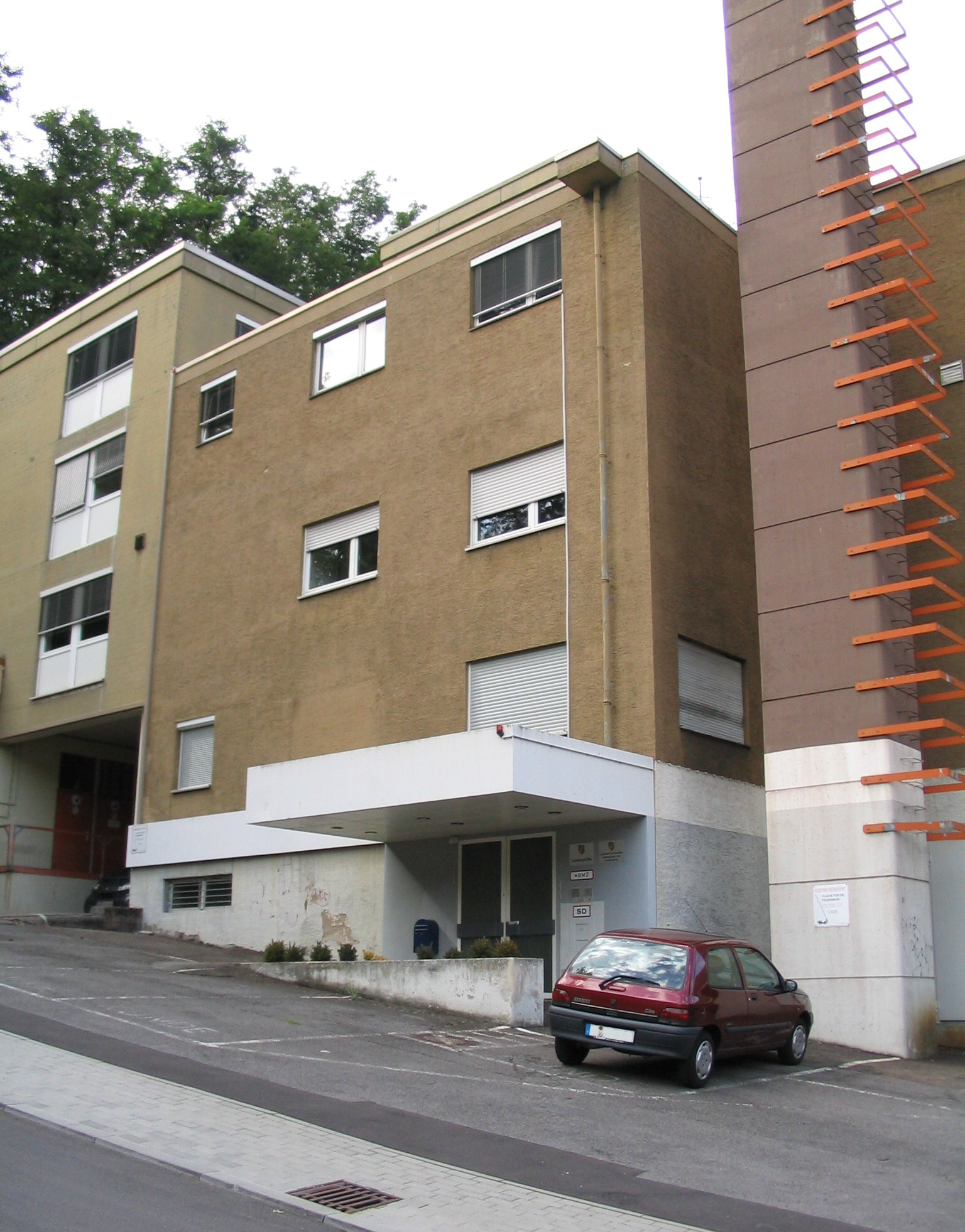 Beschreibung: Saarländisches Landesarchiv in Scheidt (Saarbrücken/Deutschland). Photographer: kh80 Date: 2005-07-28 License: GFDL and cc-by-sa/2.0/de